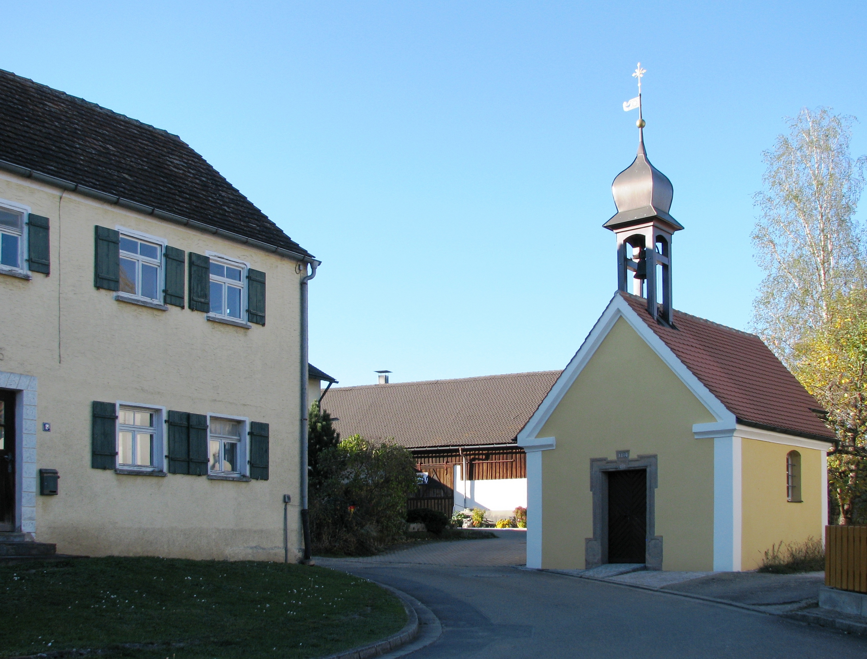 Grauwinkl, Ortsteil von Hilpoltstein im mittelfränkischen Landkreis Roth (Bayern), Katholische Ortskapelle von 1814